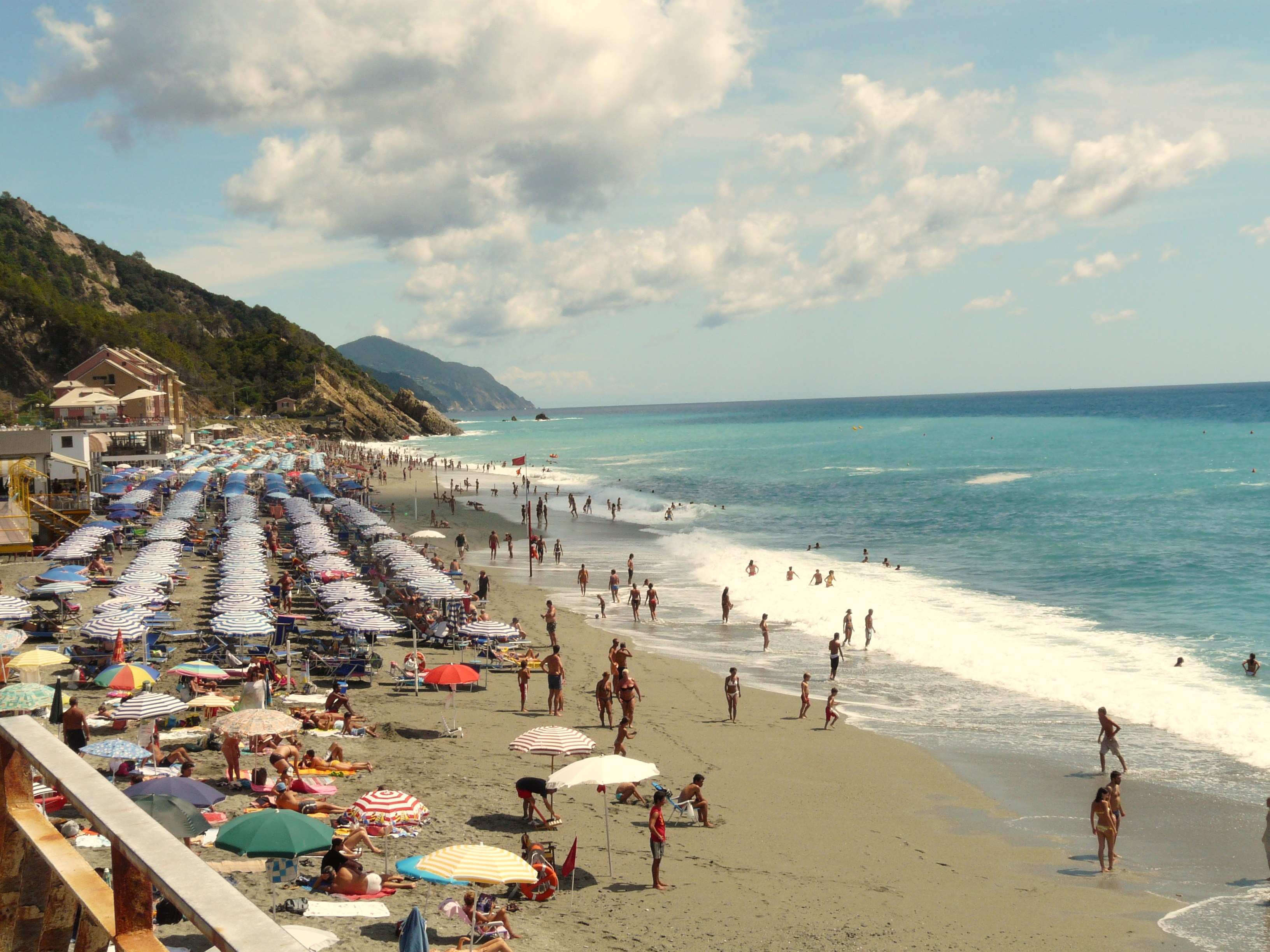 Spiaggia di Deiva Marina, Liguria, Italia